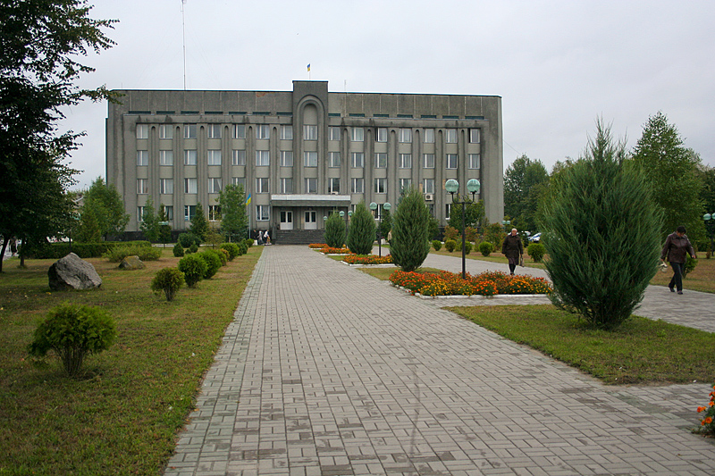 Kamin-Kashyrskyi administration